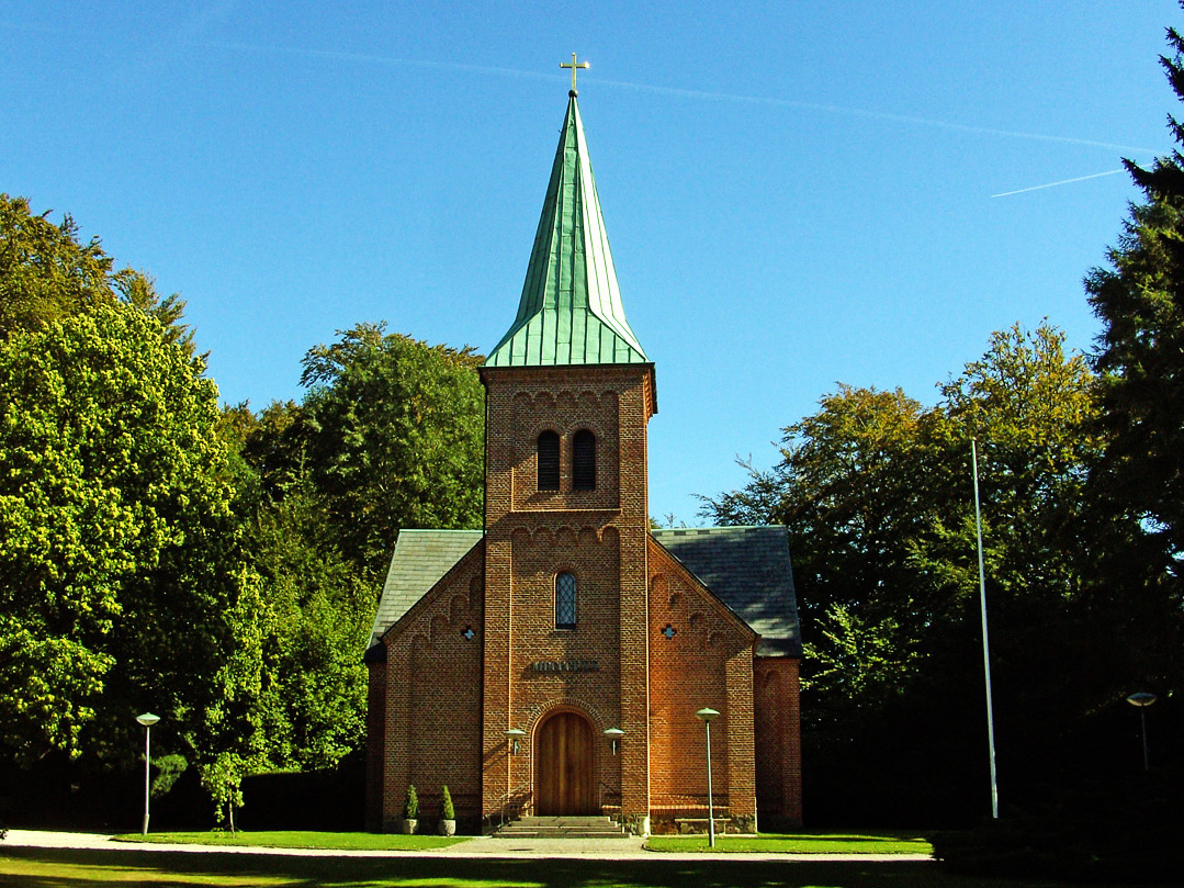 fra vest